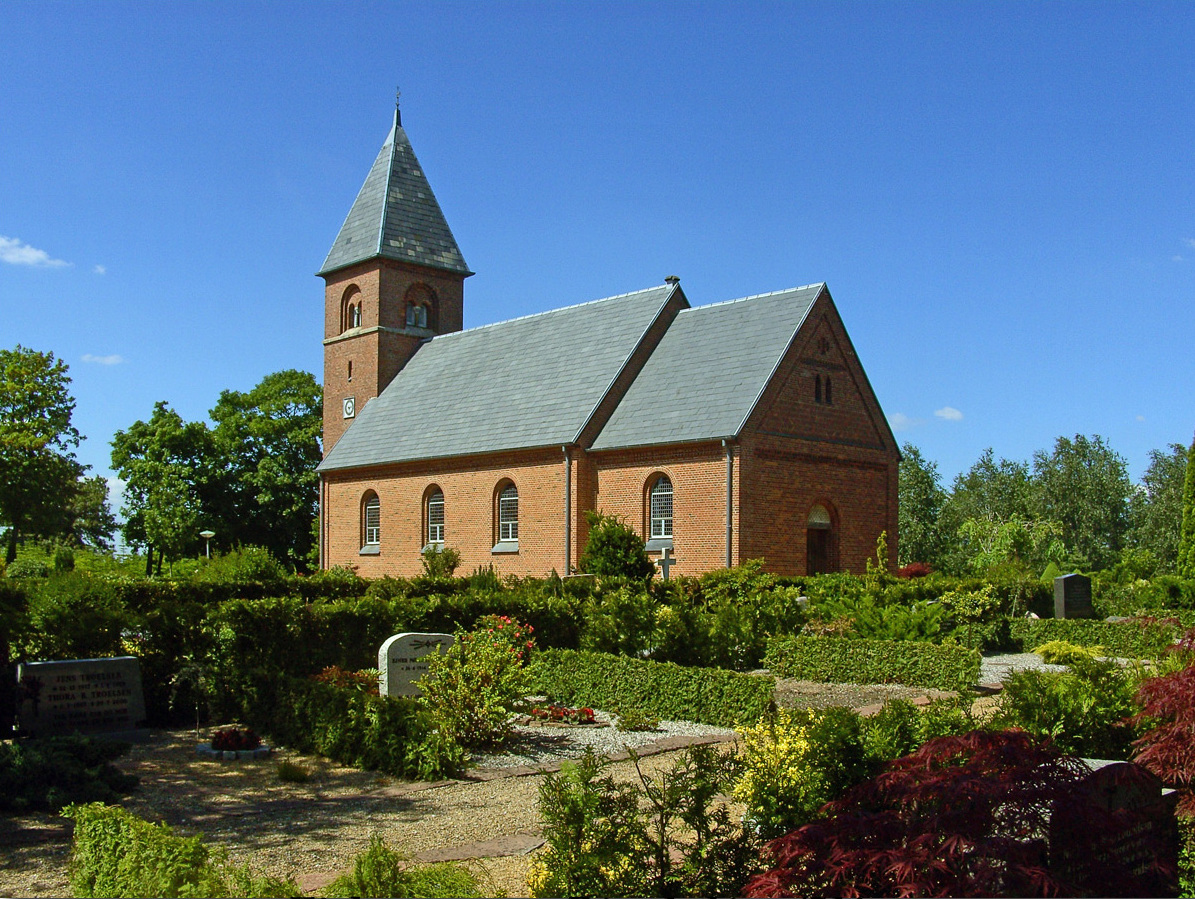 fra sydøst